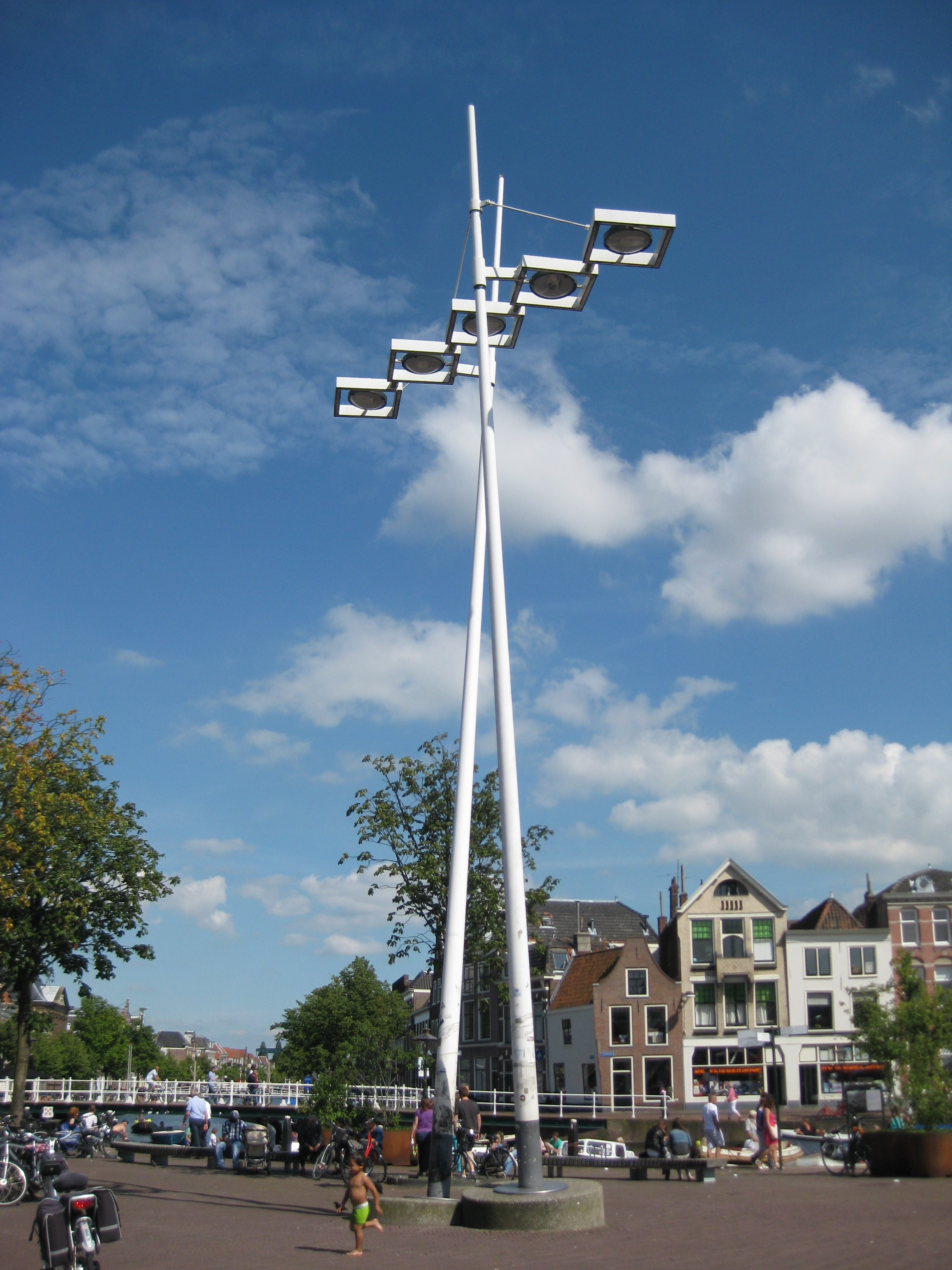 Verlichtingsornament op de Beestenmarkt in Leiden